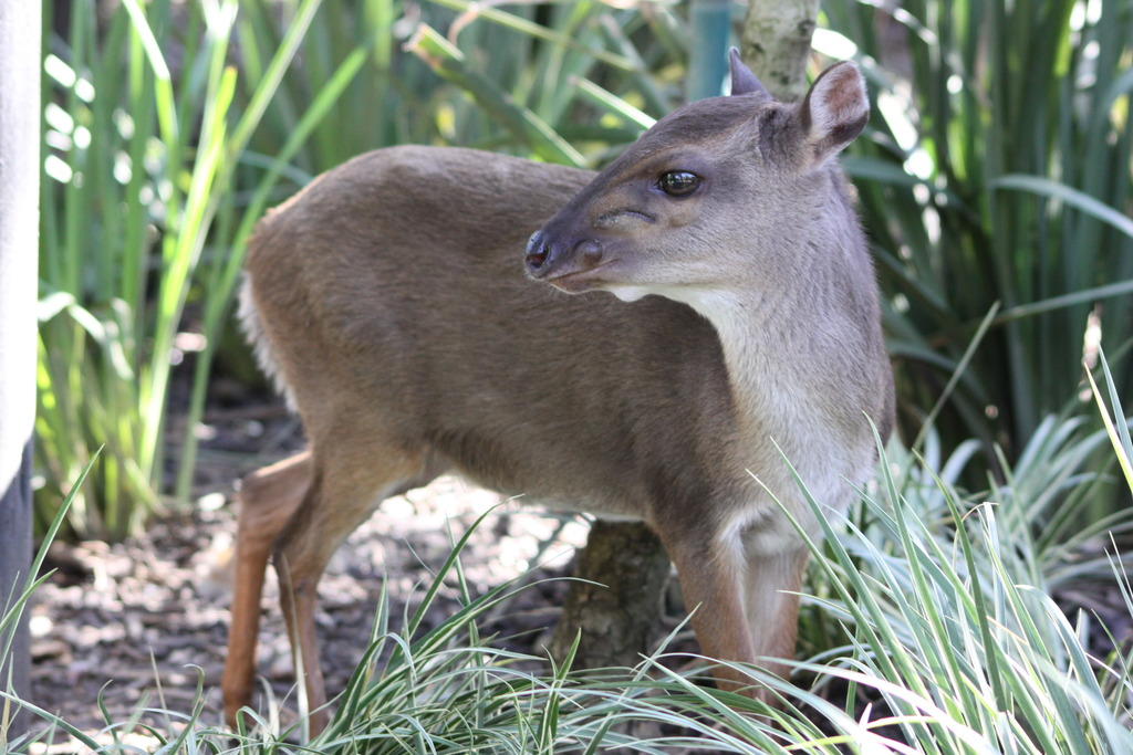 Cephalophus monticola Blue duiker